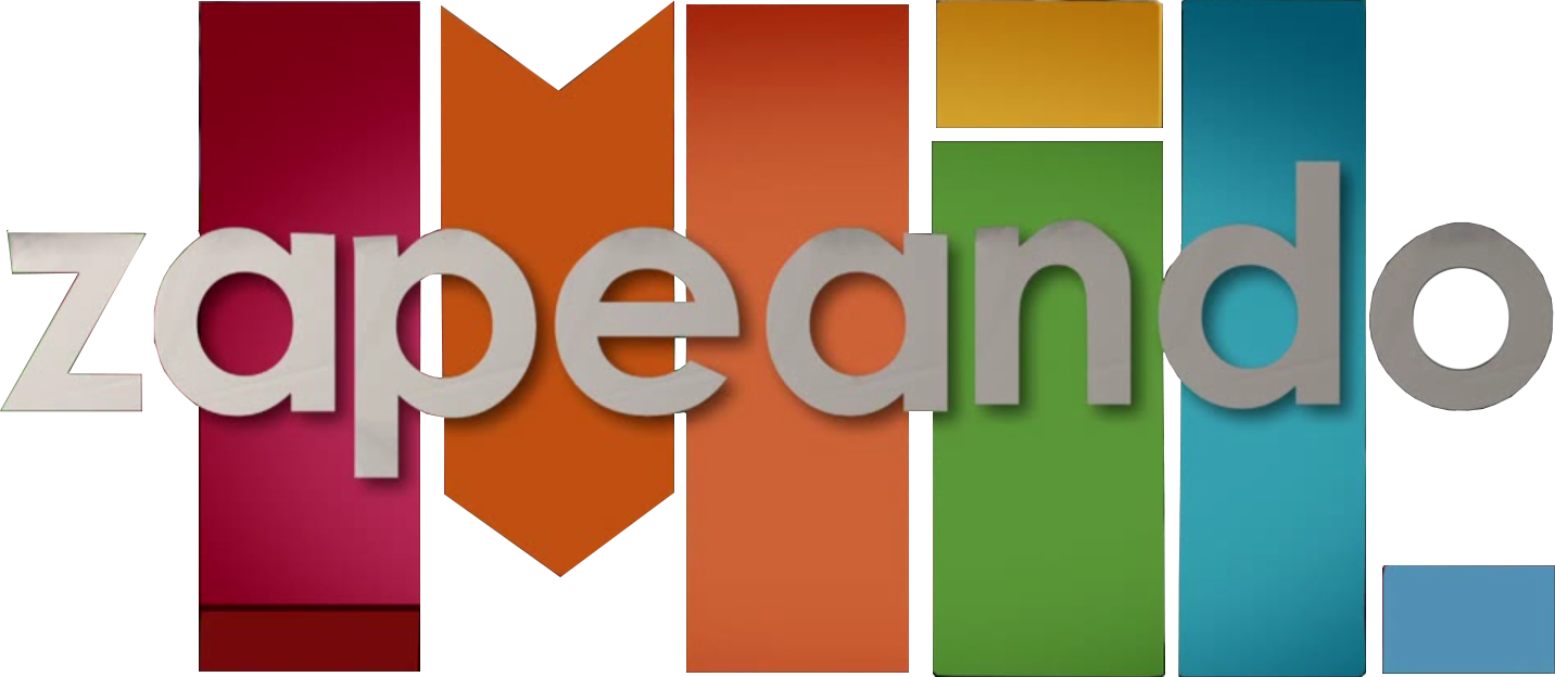 Logotipo especial para el programa 1.000 de Zapeando